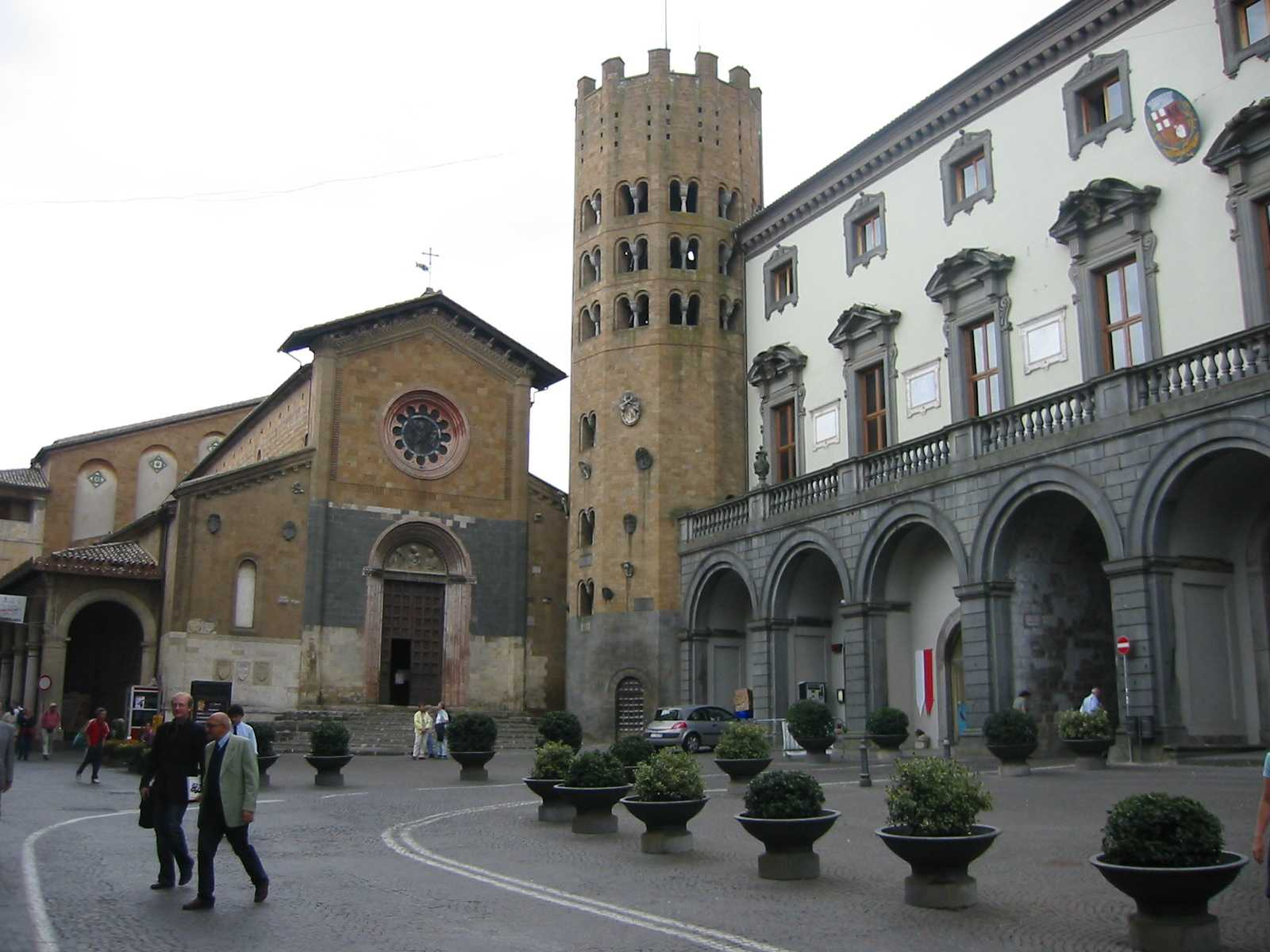 Piazza della Repubblica, Orvieto. Di fronte la chiesa di Sant'Andrea con il suo campanile dodecagonale; sulla destra il palazzo del Comune.